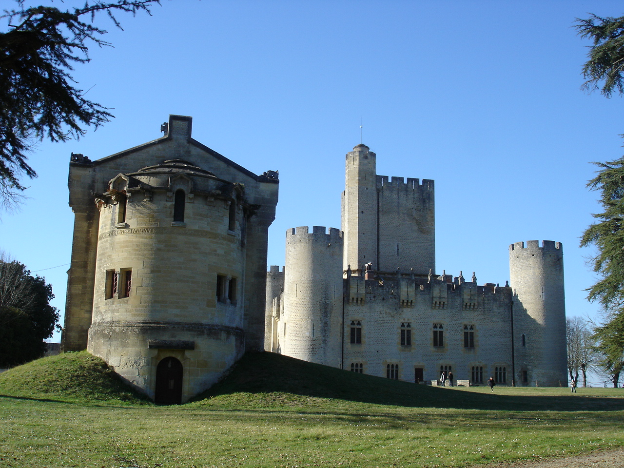 le château neuf vue depuis la chapelle